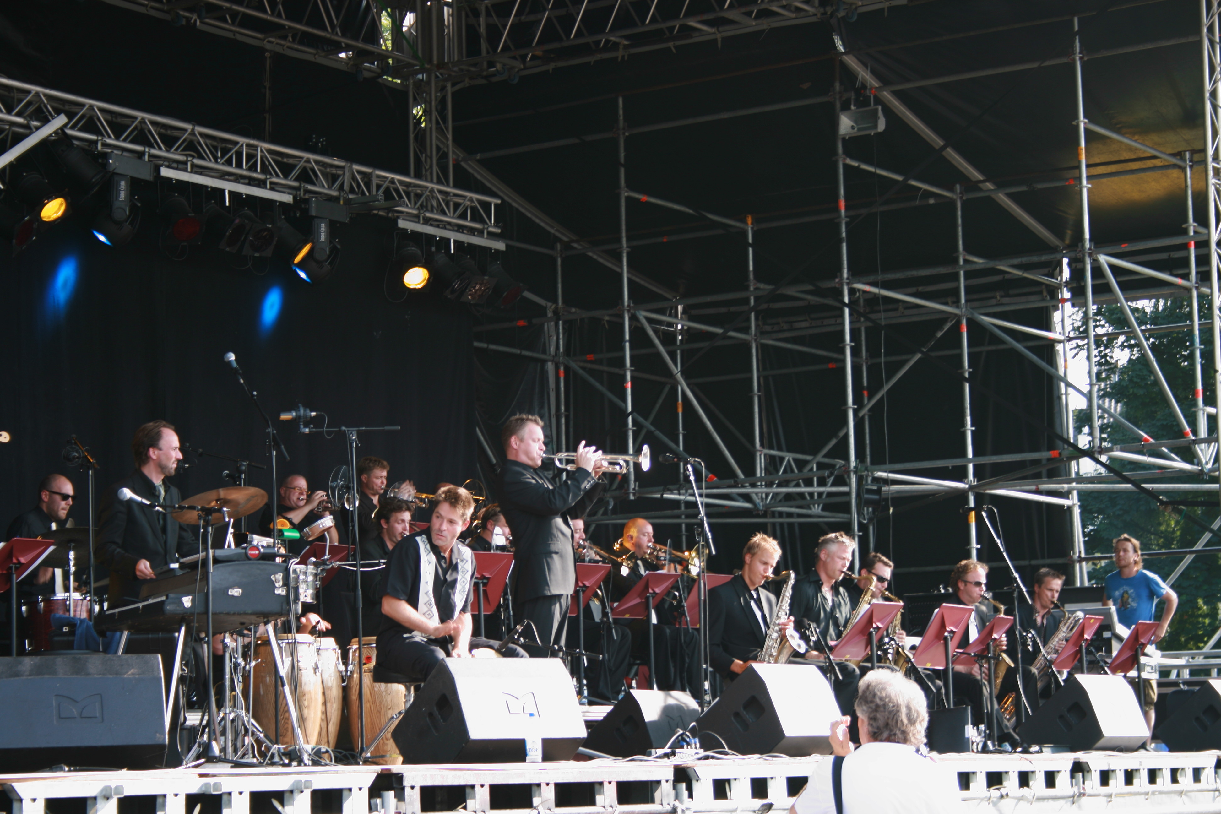 New Cool Collective Big Band bij een optreden in Sittard.